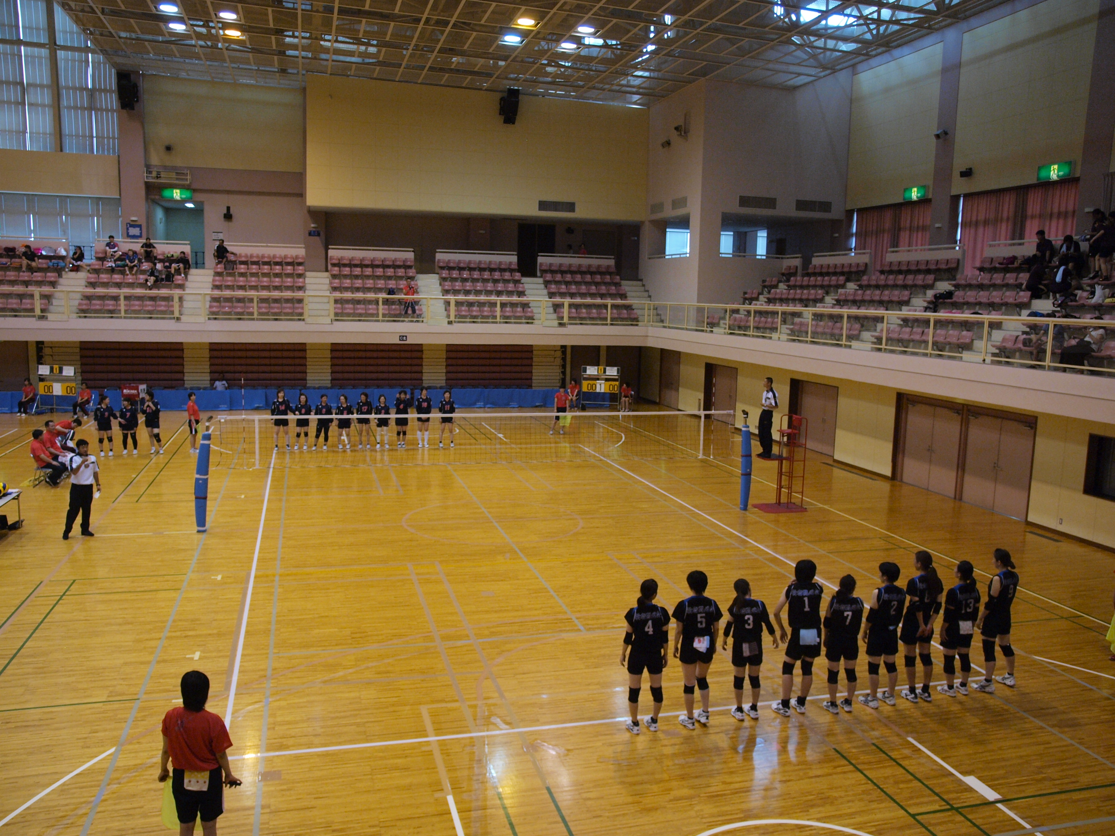 9人制バレーボールにおけるサービス順の確認方法。エンドラインに先発競技者がサービス順に並び、副審が確認している。